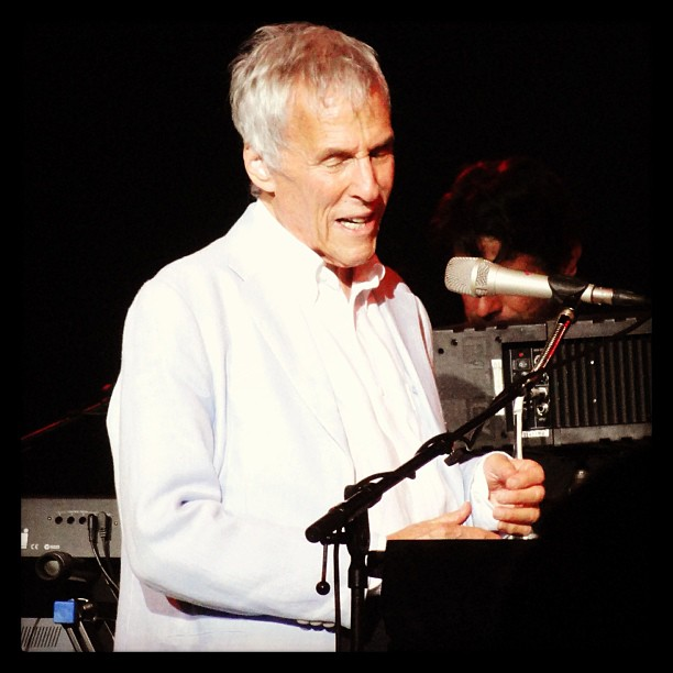 Burt Bacharach